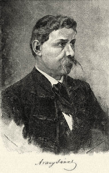 Arany János. Morelli Gusztáv fametszete. Megjelent Az Osztrák-Magyar Monarchia írásban és képben (1887–1901) kiadványban